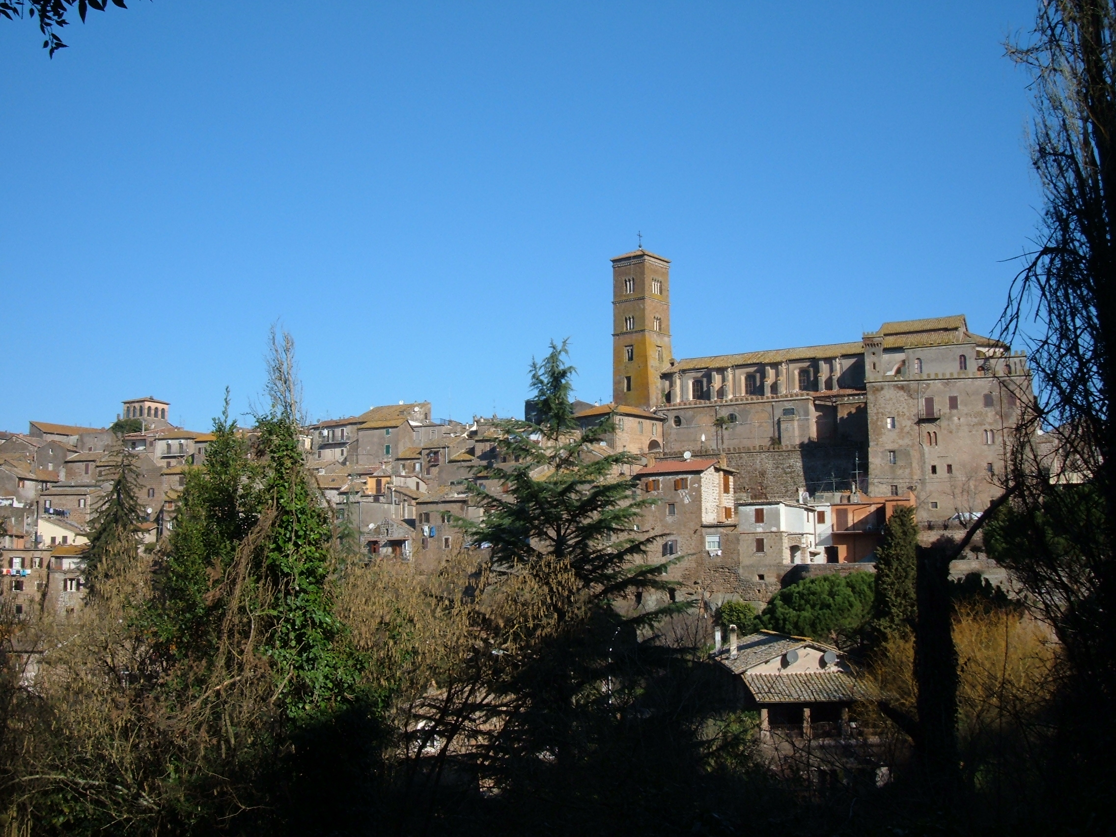 Città di Sutri, vista dalla zona archeologica.